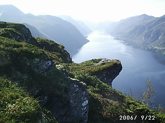 Lokalt vert denne fjellnabben kalla "Galten".Den stikk fleire meter ut frå fjellsida. Det er ei ganske nifs oppleving å gå ut på enden av fjellnabben.